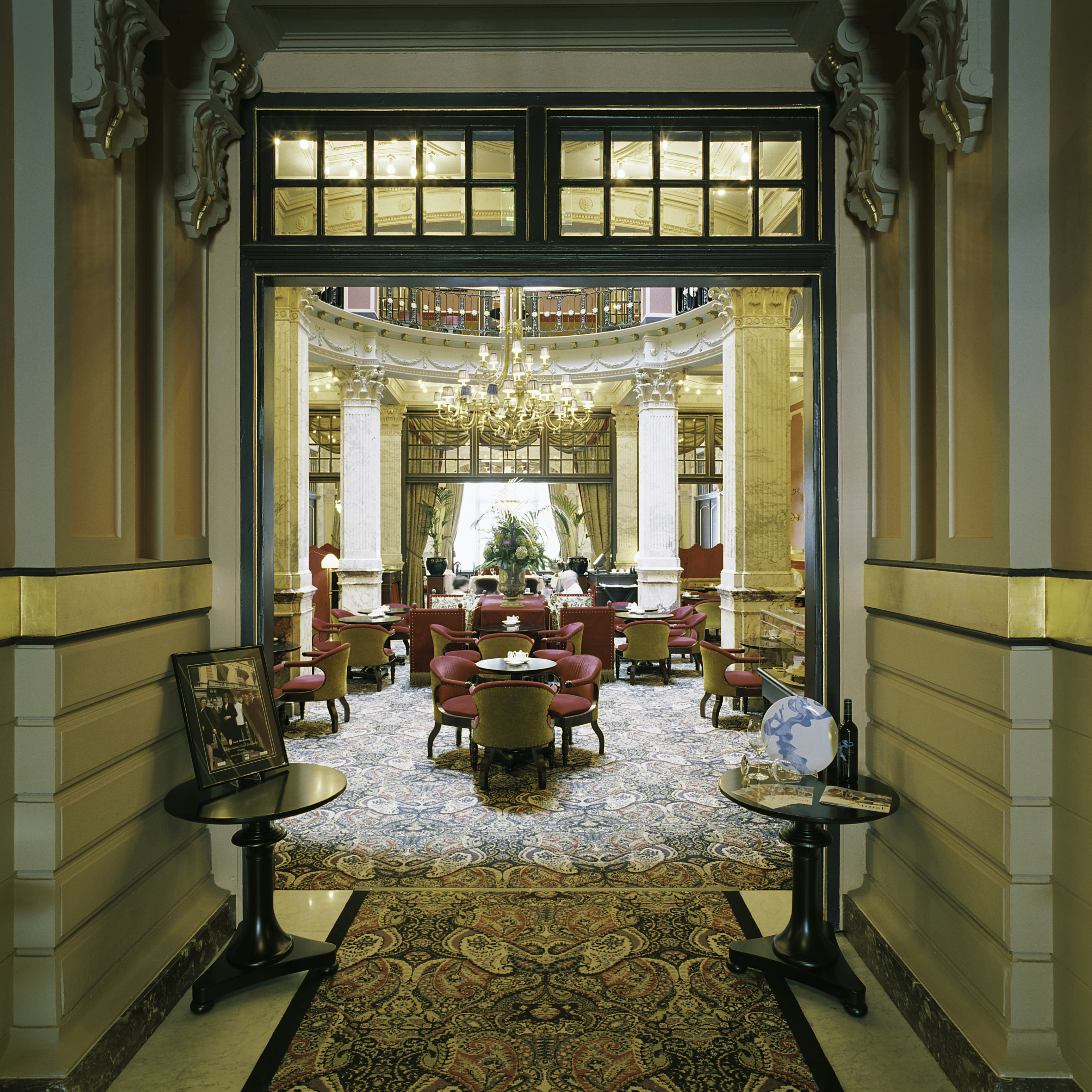 Hotel des Indes: Interieur, overzicht gang op de begane grond